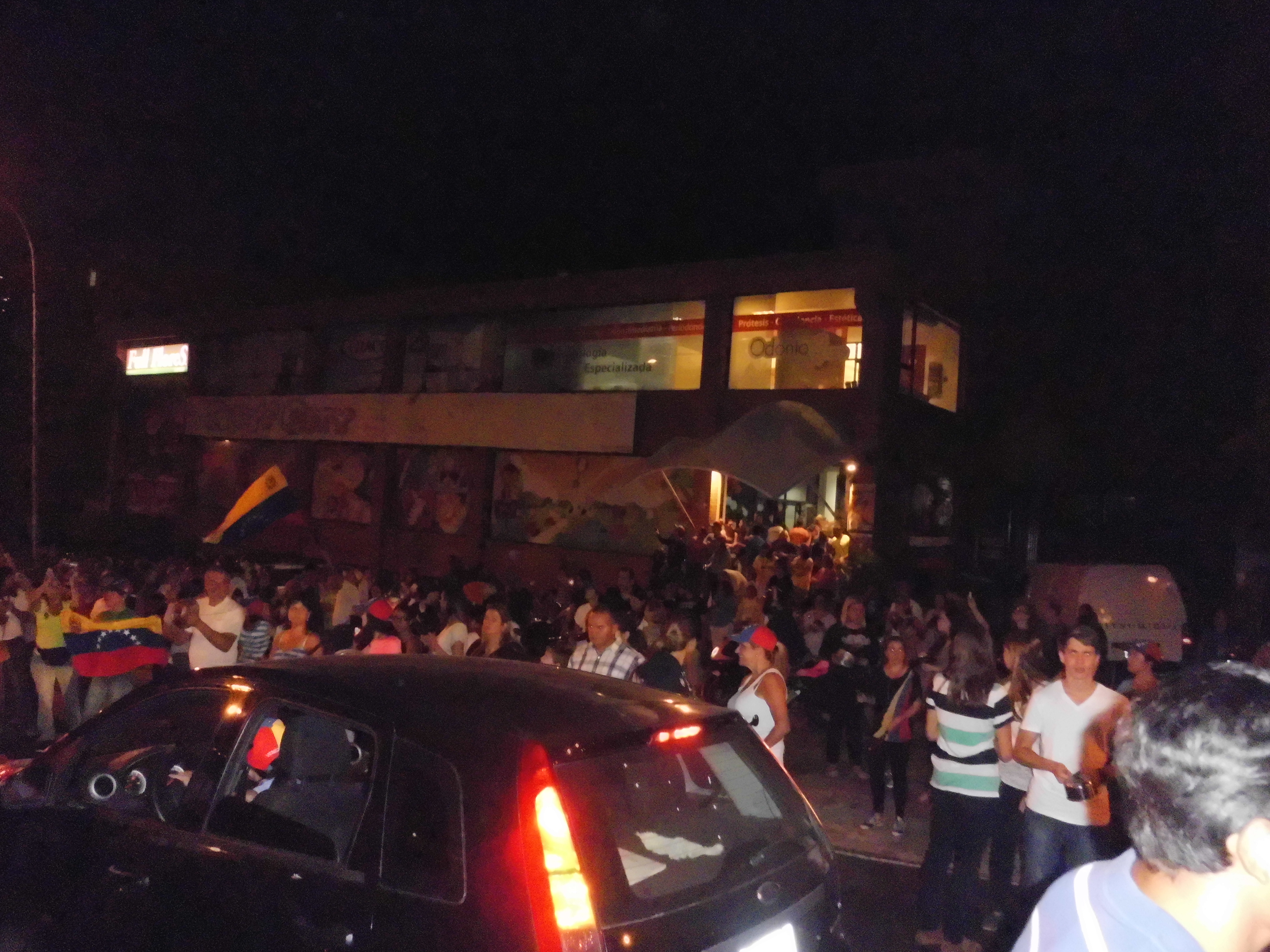 Cacerolazo contra Nicolás Maduro - La Boyera Municipio el Hatillo, Estado Miranda Venezuela día 15 de abril de 2013 hora 8:30 a 9:30 pm